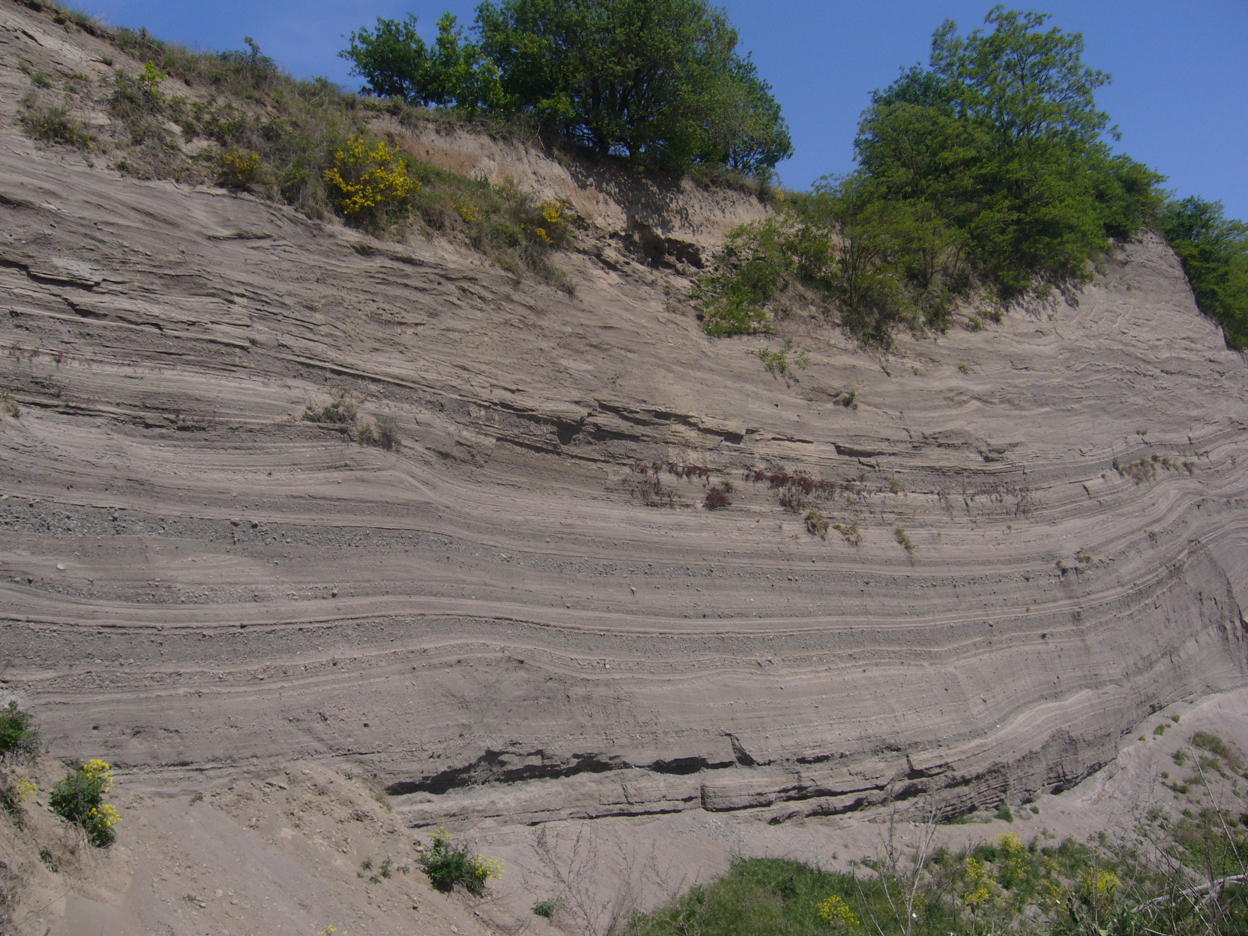 La couche supérieure, soit l'ULST - Upper Laacher See Tephra - est la zone la plus riche en phénocristaux et en minéraux mafiques. La couche moyenne - MLST, Middle Laacher See Tephra - présente des échantillons plus hétérogènes et de couleur variable. Dans le bas, les ponces blanches éjectées en premieres - LLST , Lower Laacher See Tephra - forment des strates horizontales, chaque strate correspondant à une explosion. Elles sont fortement vacuolaires et contiennent peu de phénocristaux.